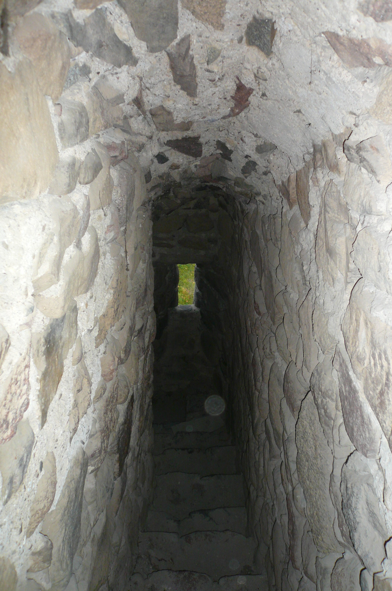 Dolsko - rzymskokatolicki kościół filialny p.w. św. Elżbiety, 2 poł. XIII (schody na I piętro wieży kościoła, widok z góry)